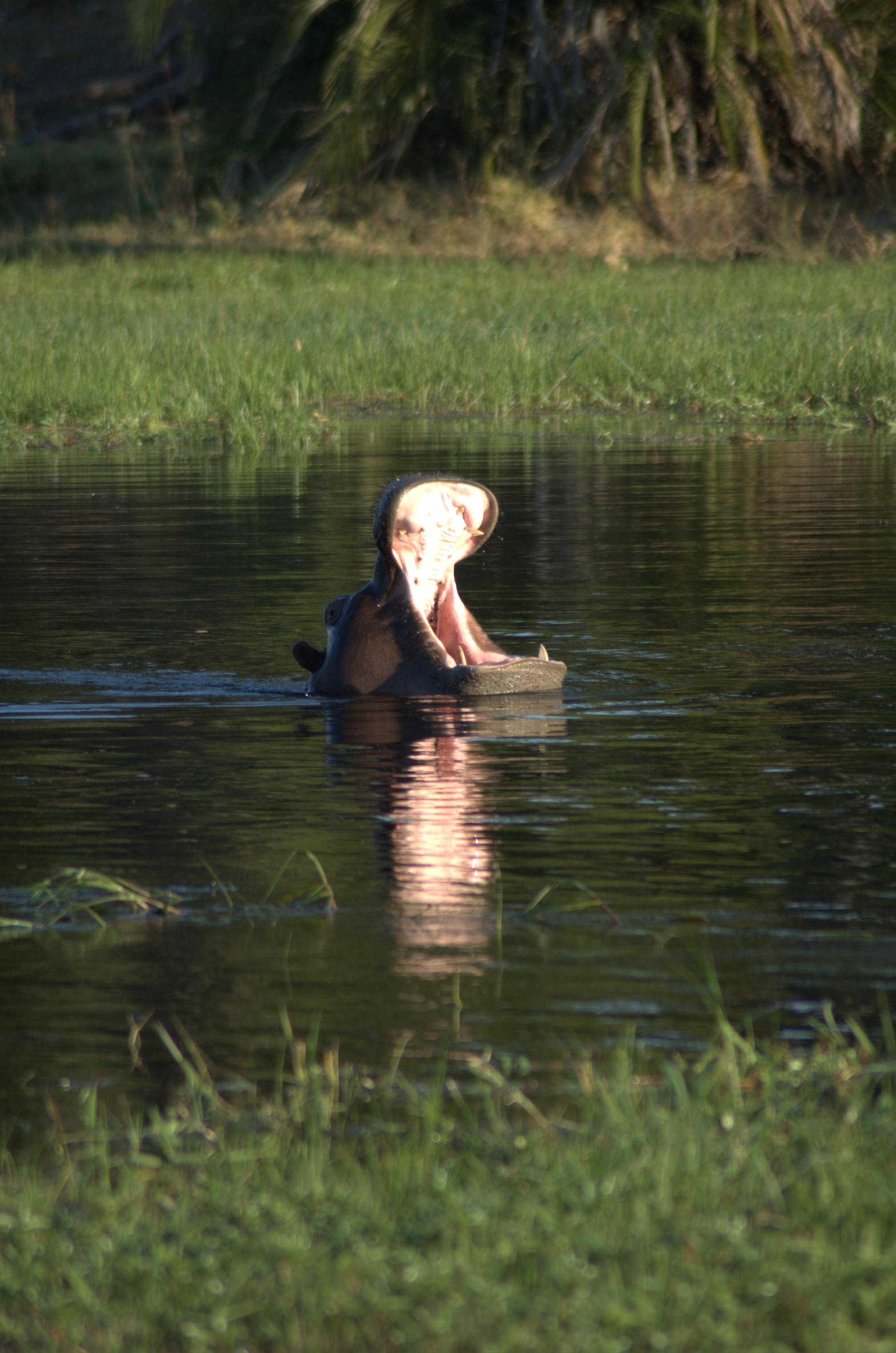 Бегемот в Ботсвані. Бегемоти розкривають рота, щоб налякати інших показуючи зуби.